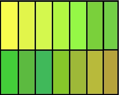 En esta imagen se muestran las tonalidades que puede adquirir el color de un Peridoto.